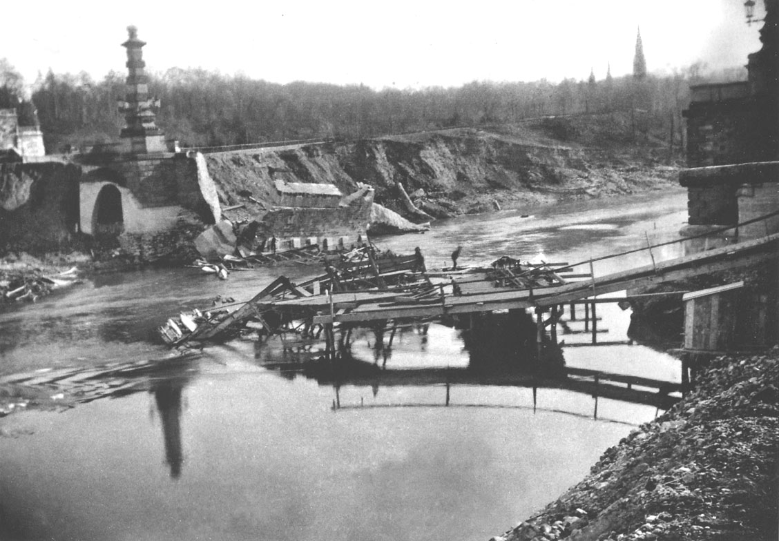 Die durch Hochwasser am 14.09.1899 eingestürzte Luitpoldbrücke in München